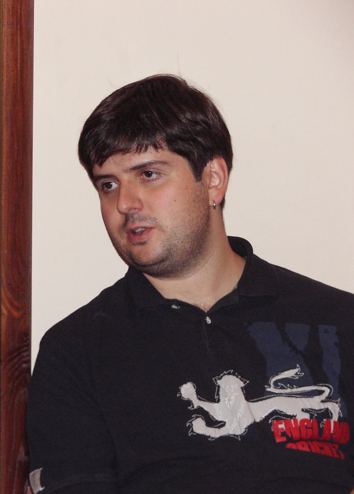 GM Peter Svidler Russia, EuroChess Iraklion 2007